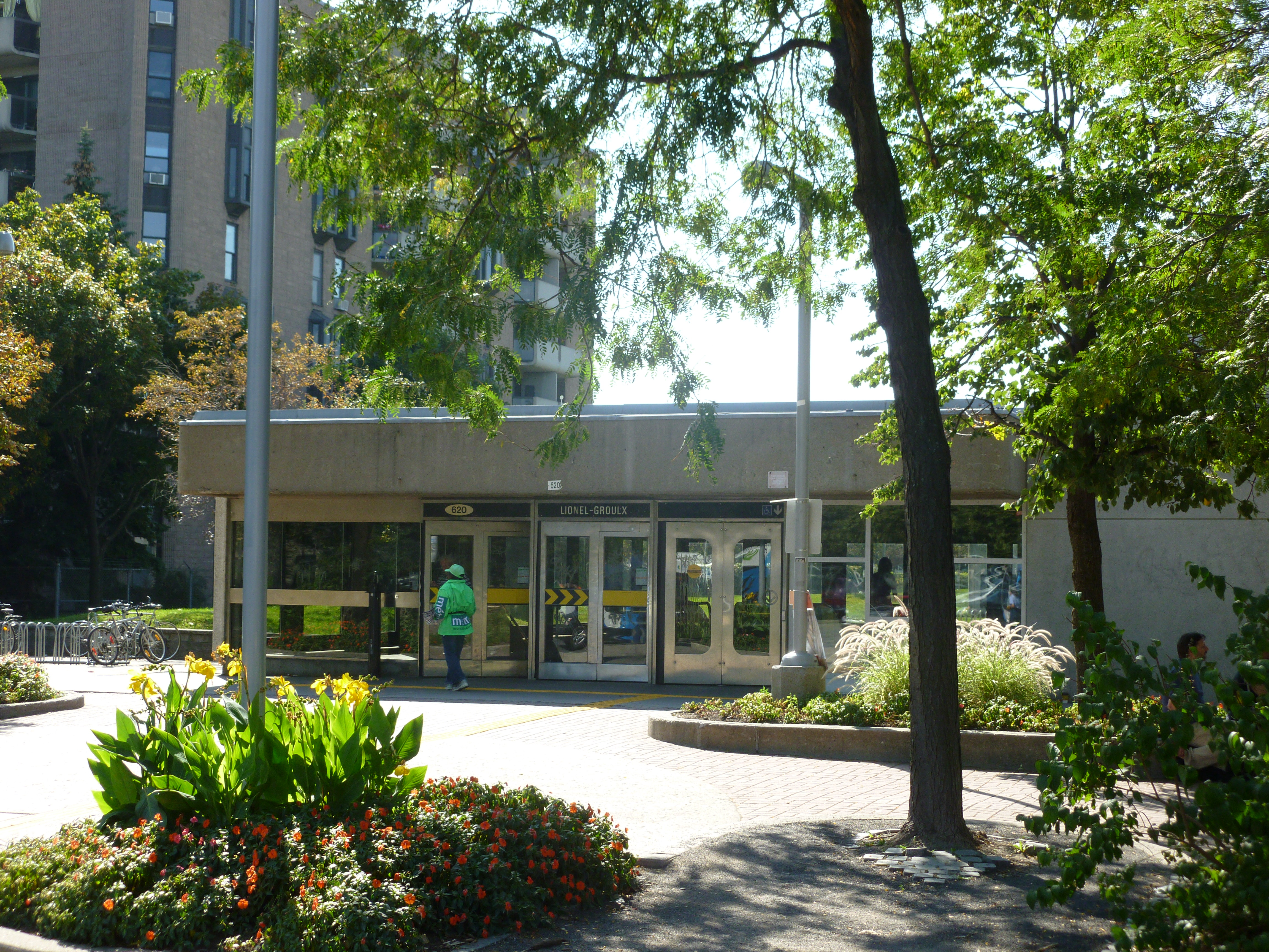 Édicule de la station Lionel-Groulx à Montréal, Québec, Canada